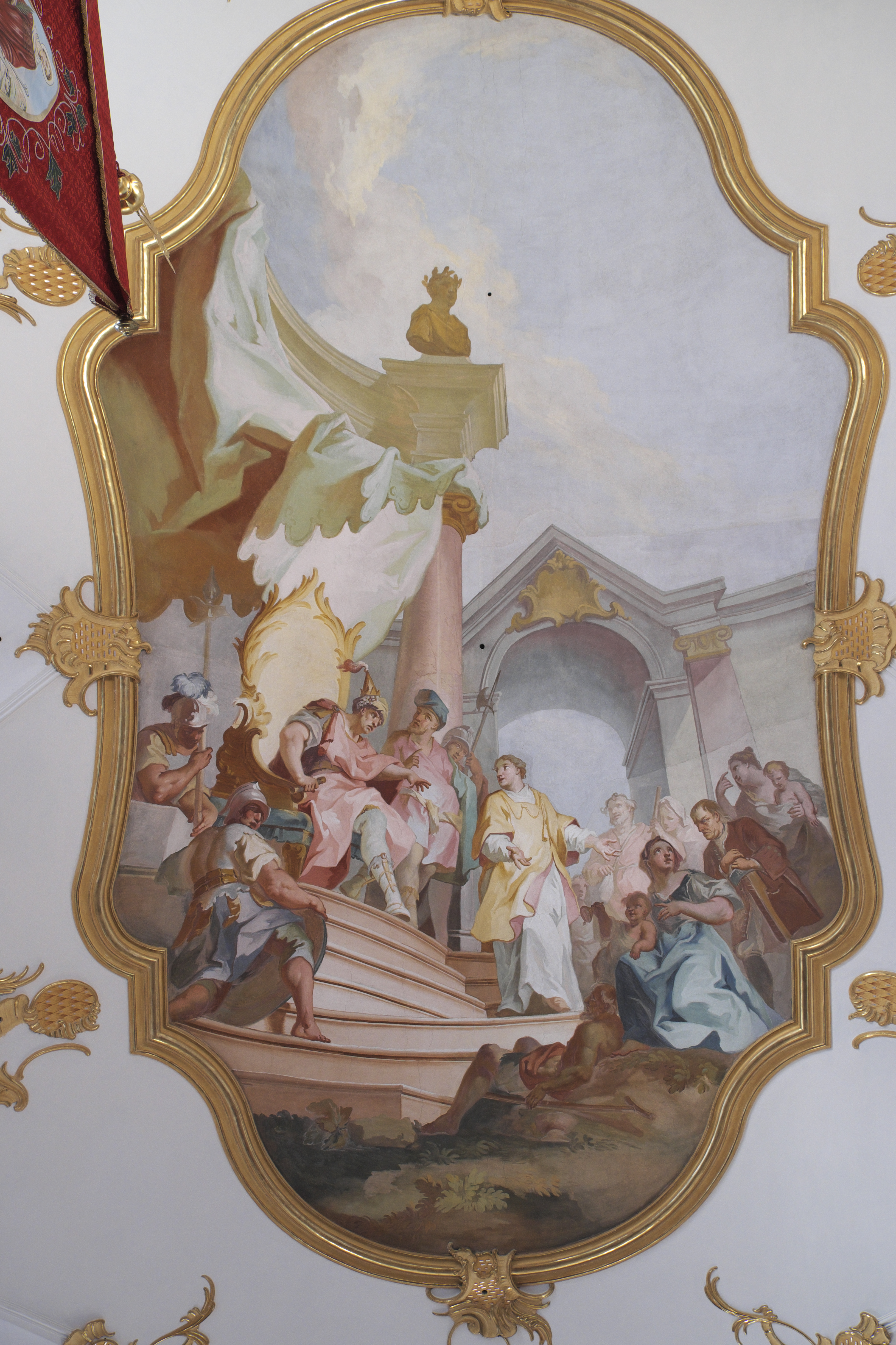 Katholische Filialkirche St. Laurentius in Pflugdorf (Vilgertshofen) im oberbayerischen Landkreis Landsberg am Lech (Bayern/Deutschland), Deckenfresken um 1757, Johann Baptist Zimmermann und seiner Werkstatt zugeschrieben; Darstellung: Szenen der Legende des heiligen Laurentius